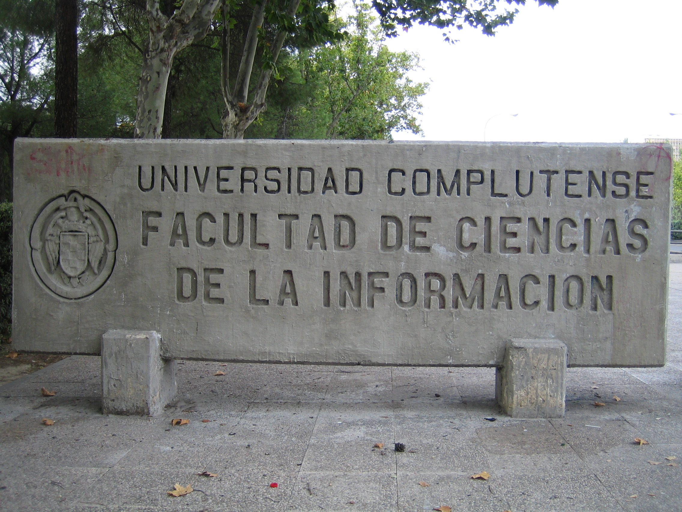 Madrid. 10/22/2007. Autor: Antonio Peiró. 2.272x1.704 px (1,2 MB)